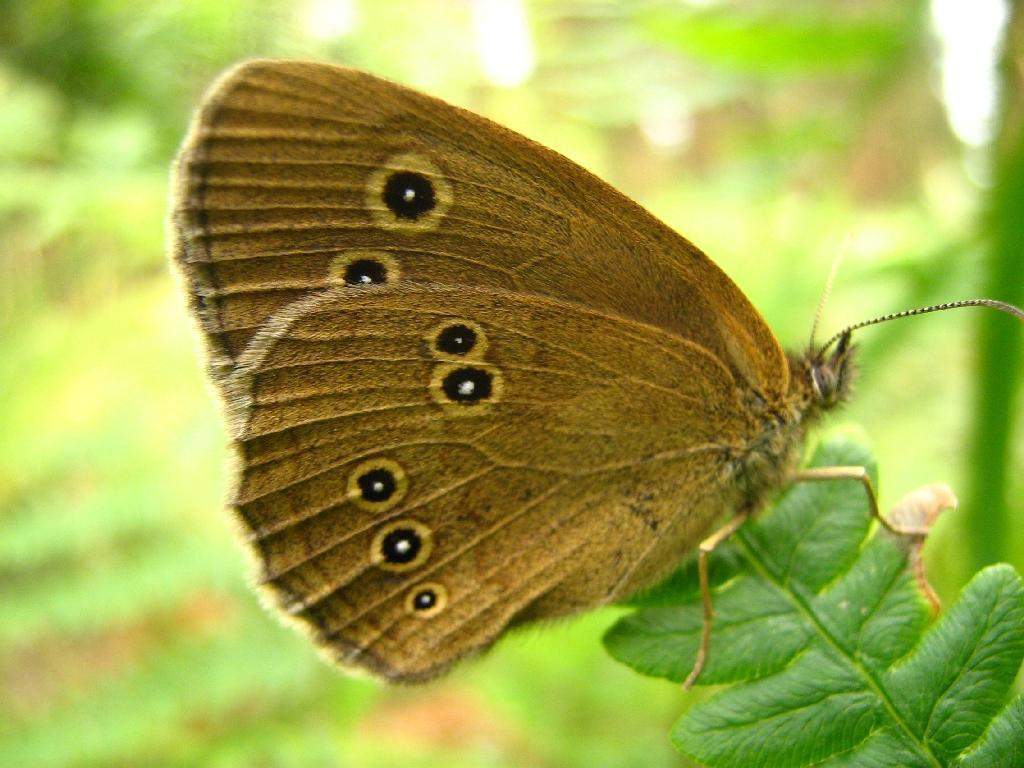 Aphantopus hyperantus, (Brauner Waldvogel) Familie Nymphalidae (Edelfalter). Fundort: Nauener Stadtwald (Brandenburg, Germany), auf Adlerfarn sitzend